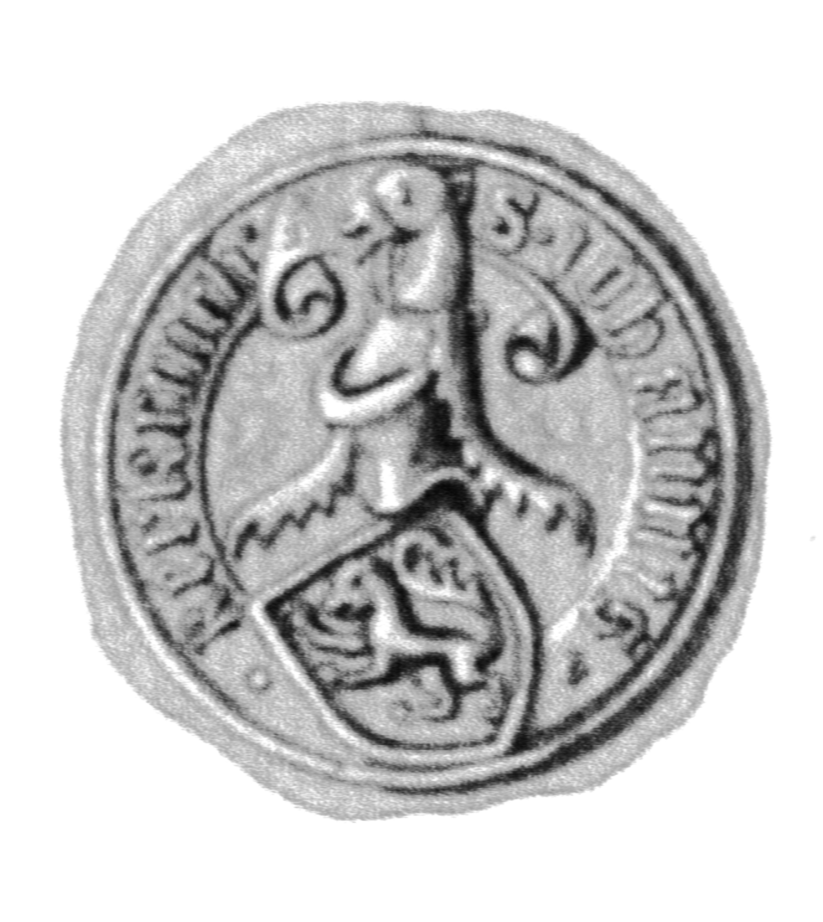 Siegel des Ratsmannes Johannes Kerking. Das Siegel stammt aus der Zeit um 1516. Siehe Emil Ferdinand Fehling: Lübeckische Ratslinie, Nr. 572 (Johann Kerkring).